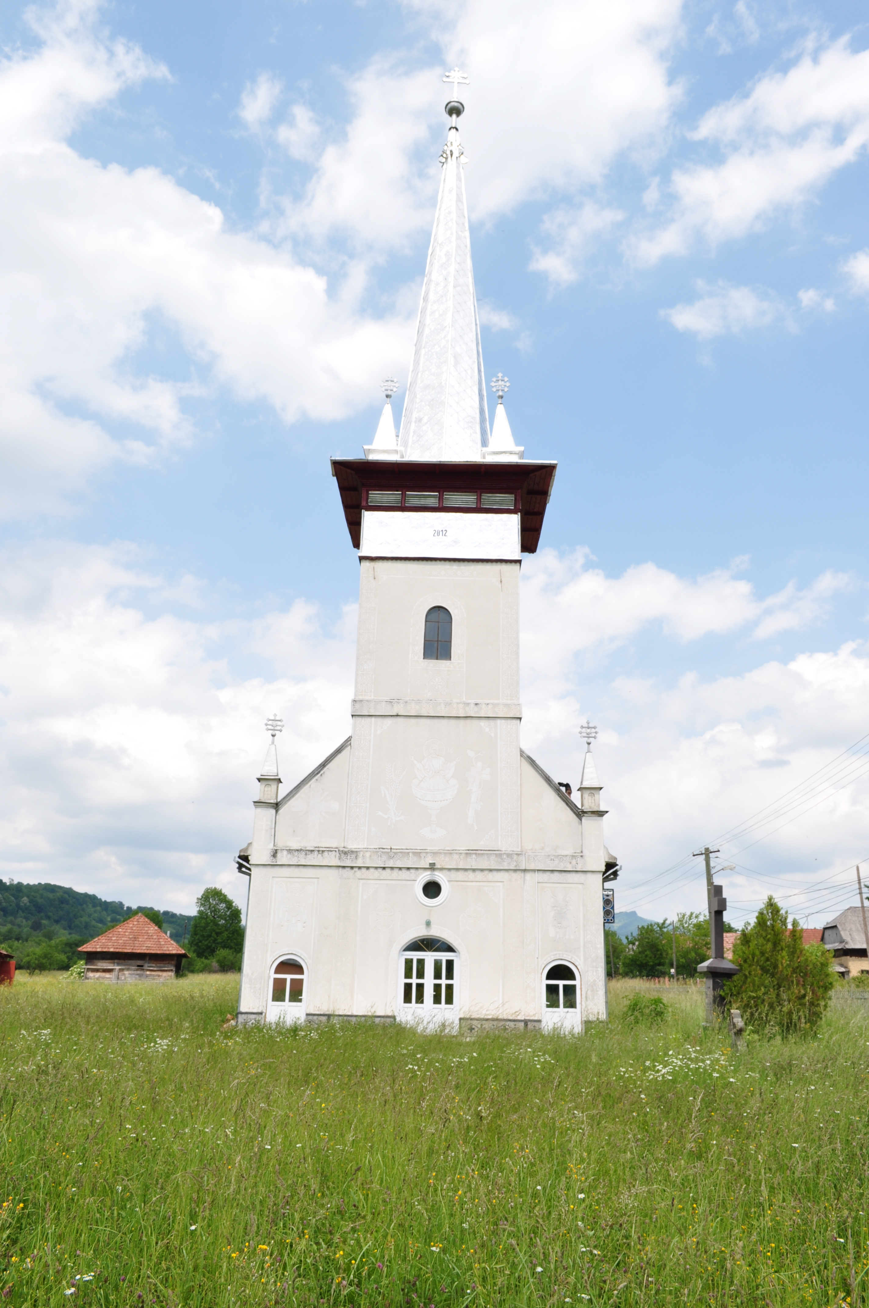 Biserica "Sf. Arhangheli Mihail și Gavril" din Fânațe, județul Maramureș